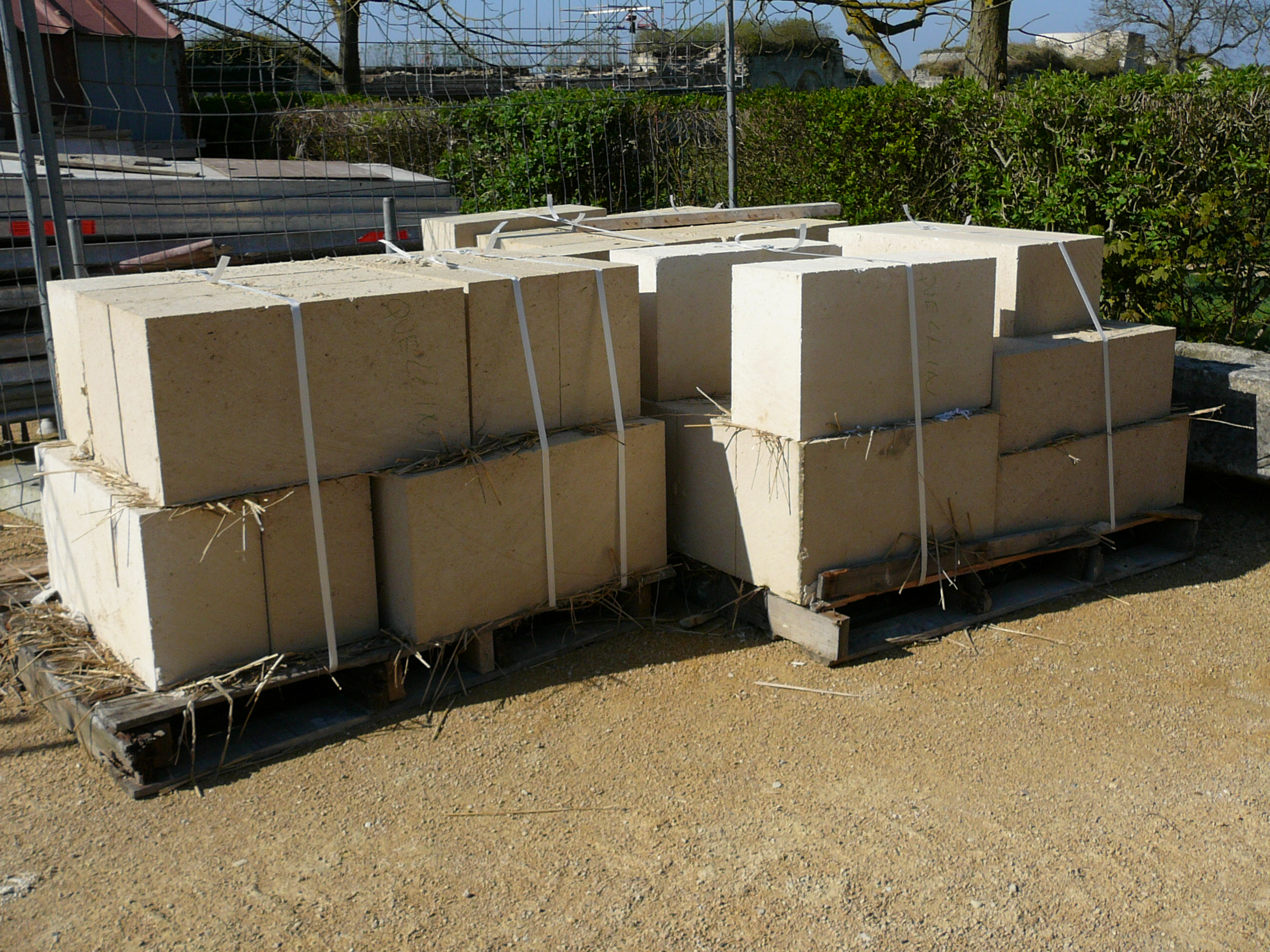 Pierres de taille conditionnées pour le transport depuis la carrière, en attente d'être taillées. Auteur : So Leblanc, 2007